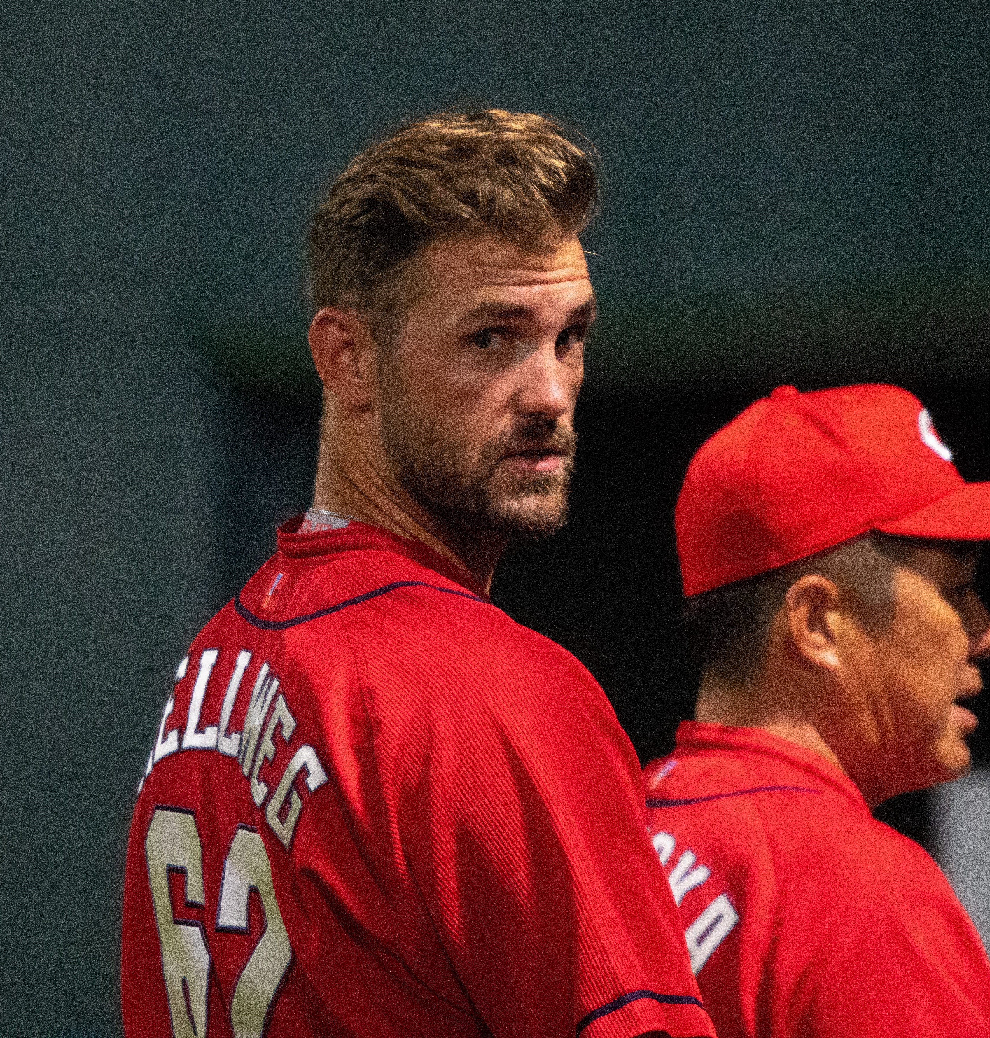 2018/8/10 ウエスタン・リーグ